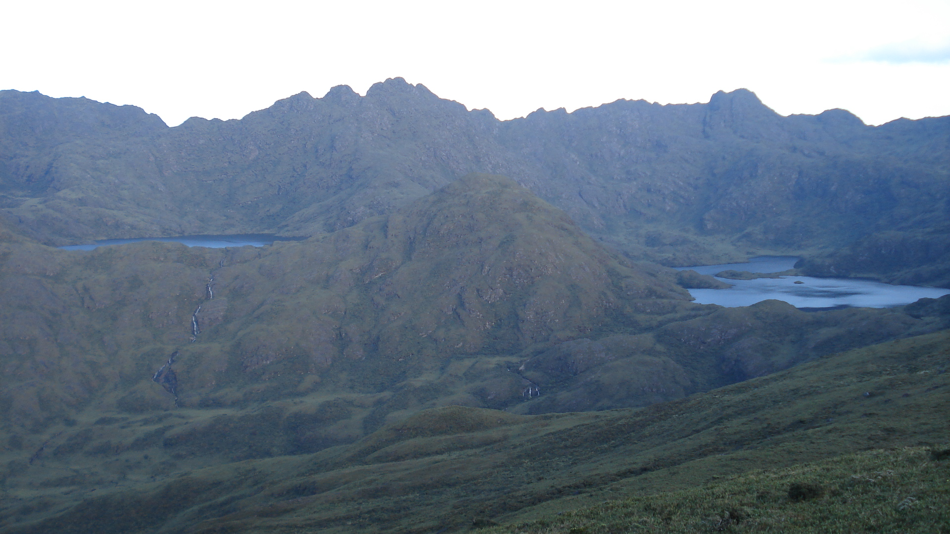 Luego de una larga caminata faltando 4 kilómetros ya se puede divisar la primera Laguna del Sistema Lacustre de las Lagunas del Compadre